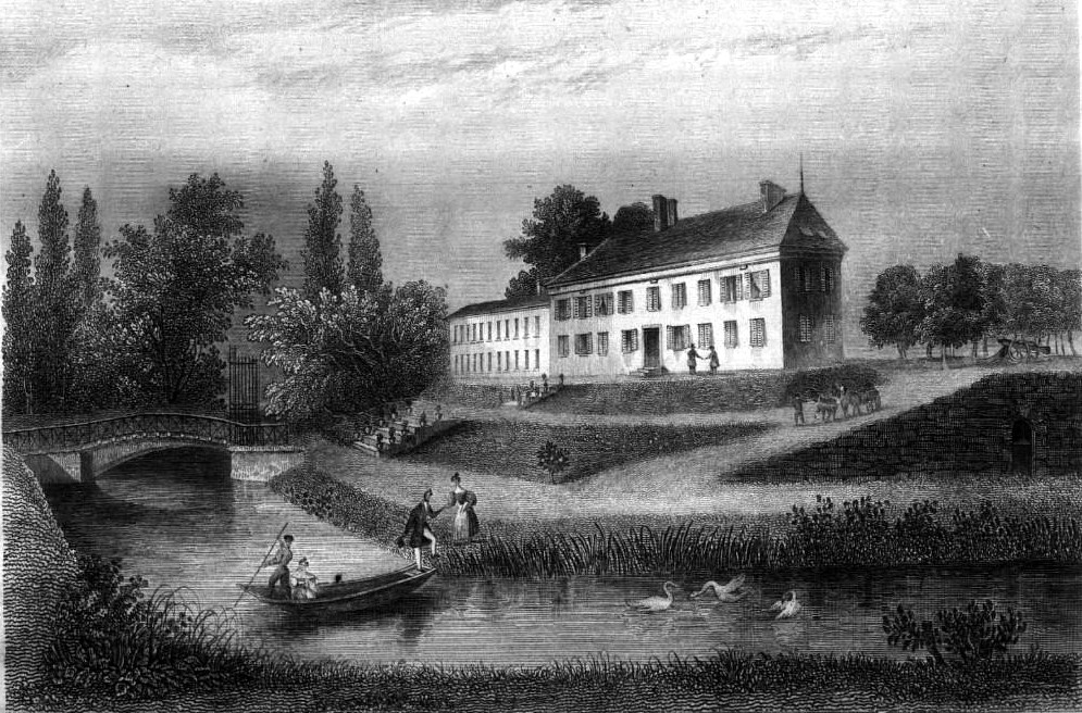 Image en provenance du livre : Eusèbe Girault de Saint-Fargeau, Guide pittoresque du voyageur en France, contenant la statistique et la description complète des quatre-vingt-six départements, orné de 740 vignettes et portraits gravés sur acier, de quatre-vingt-six cartes de départements et d'une grande carte routière de la France, par une Société de gens de lettres, de géographes et d'artistes, Paris, F. Didot frères, 1838, 6 volumes in-8° (BNF : 8-L25- 46). Volume III Didot frères, 1838. Route de Paris à Nice traversant les départements de l'Isère, des Hautes-Alpes, des Basses-Alpes et du Var. auteurs dessins : Rauch (ou autre) auteurs gravures : Skelton fils, Schroeder, Bishop (ou autre)